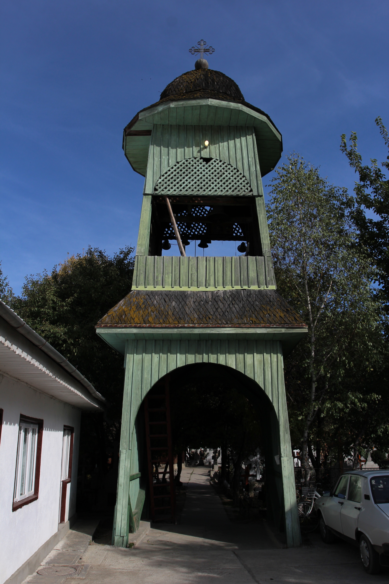 Turn clopotniță 02